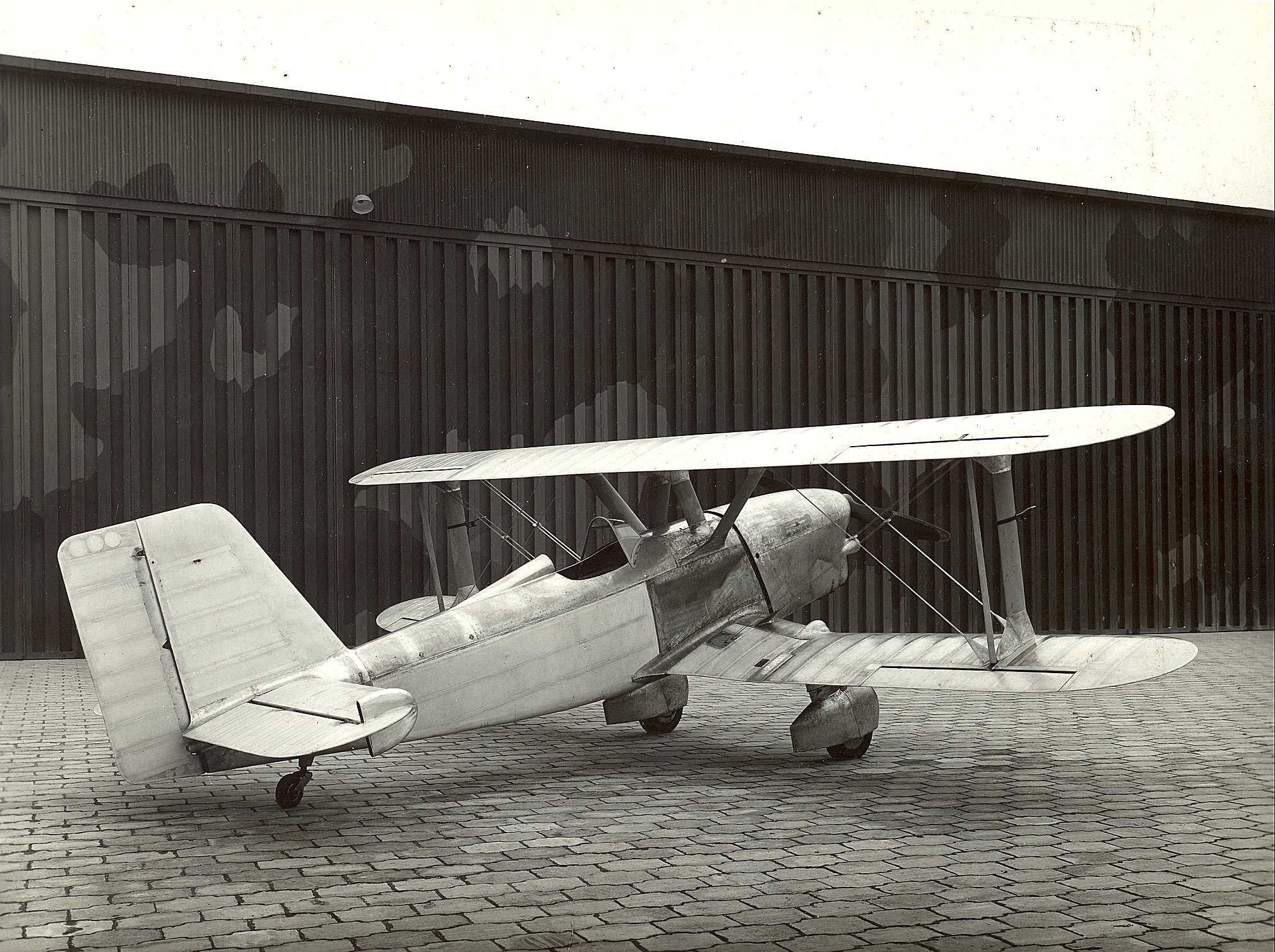 Aeronatica Caproni di Predappio